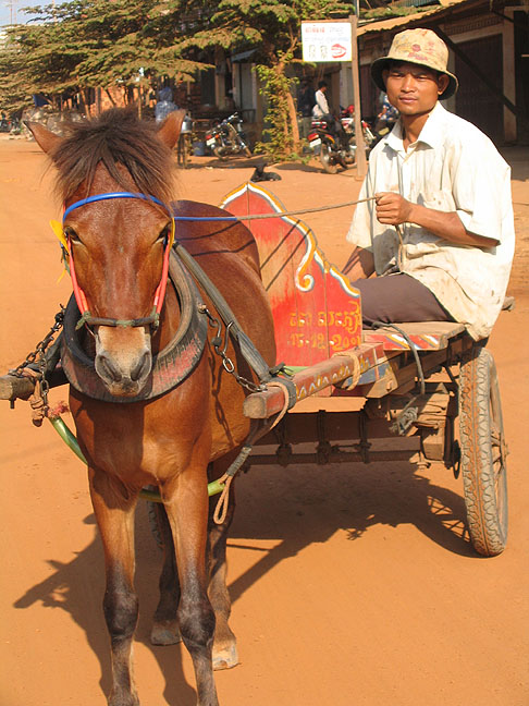 Voz v Kambodži.